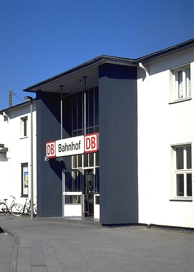 Erkelenz, Bahnhofsgebäude